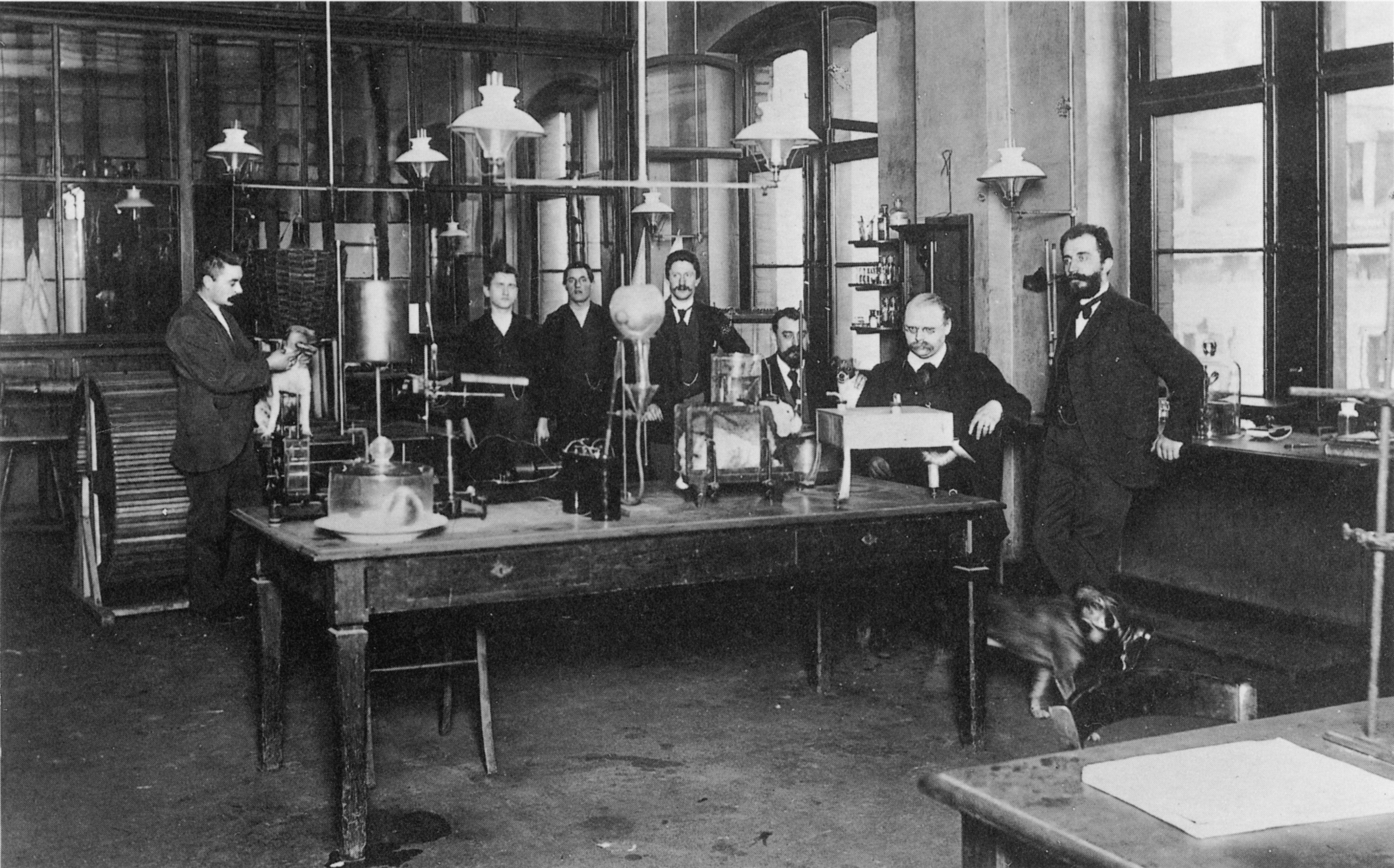 Pharmakologische Laboratorium der Bayer AG, damals „Farbenfabriken vorm. Friedr. Bayer & Co.“ in Elberfeld. Es handelt sich hier um den Neubau des Hauptlabors von 1891 (Meilensteine S. 98ff) Heinrich Dreser (* 1. Oktober 1860 in Darmstadt; † 21. Dezember 1924 in Zürich)